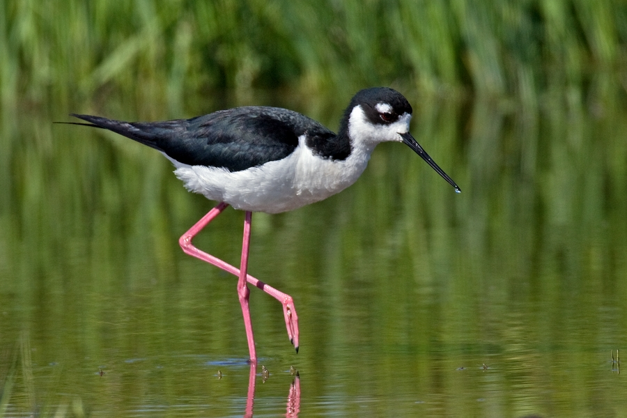 Black-Necked Stilt